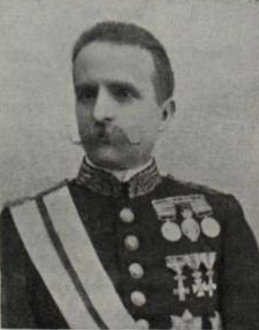 General Ochando